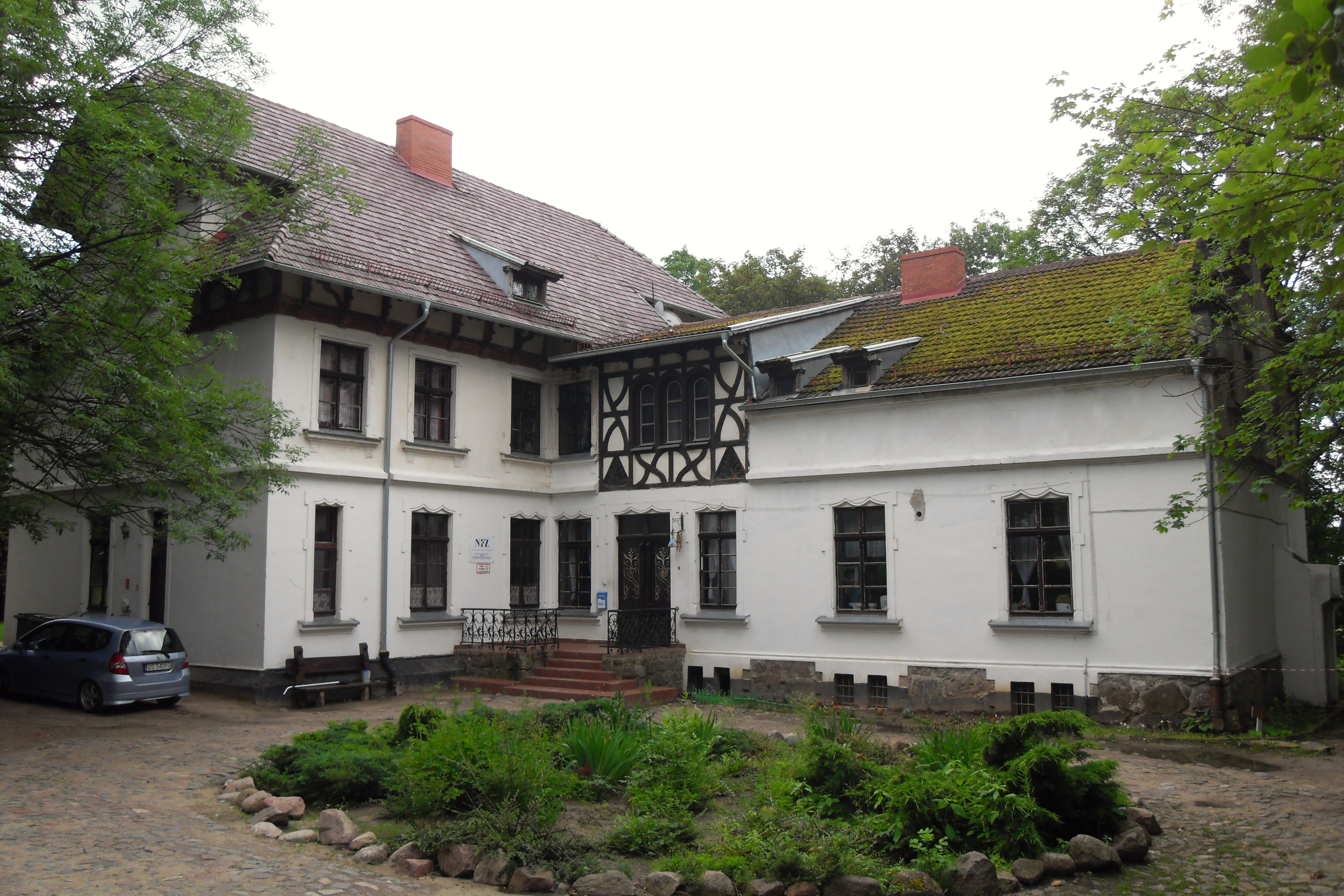 Gdańsk Matarnia. Zabytkowy dwór, ul. Agrarna 2 (zabytek nr rejestr. 1053)